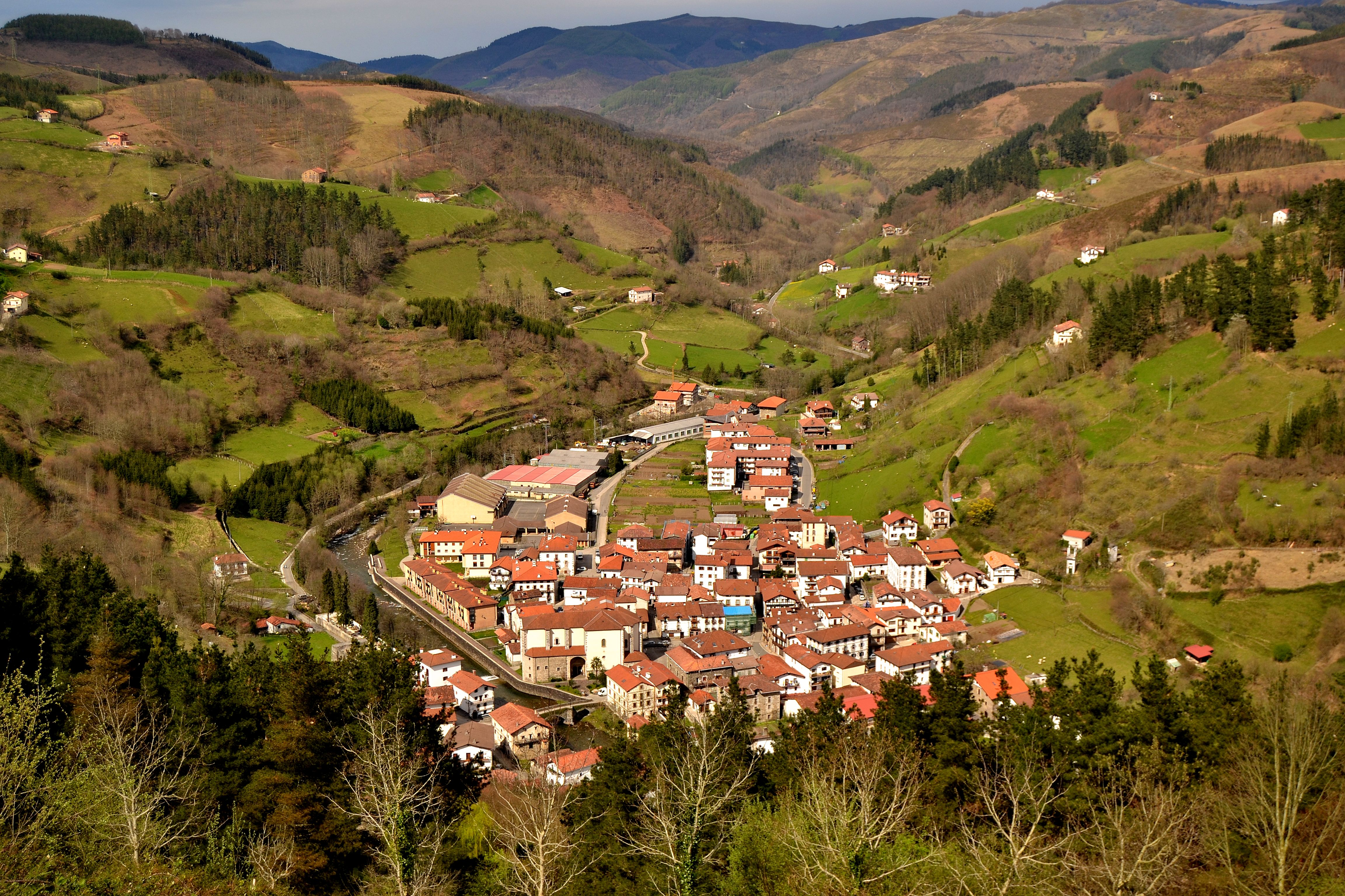 Goizueta. Nafarroa, Euskal Herria. Goizueta. Navarre, Basque Country.